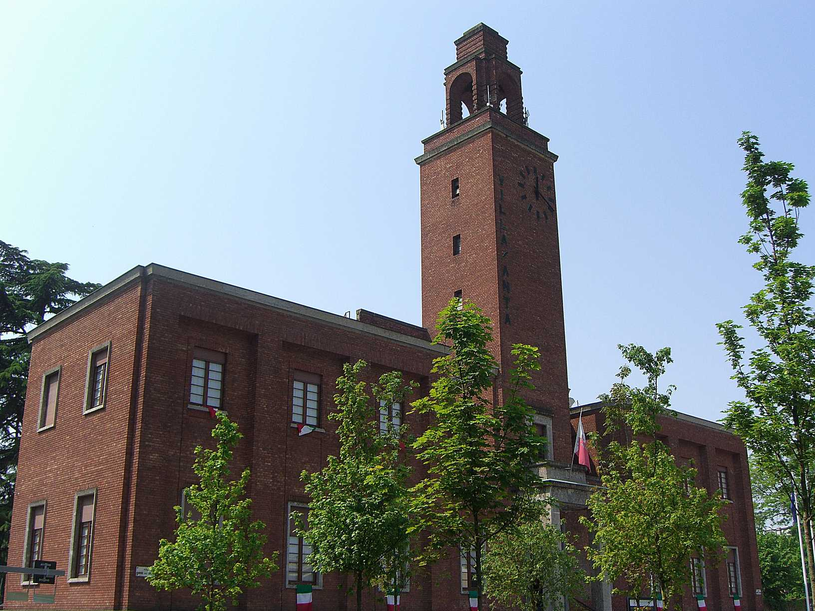 MB Villasanta Mu nicipio